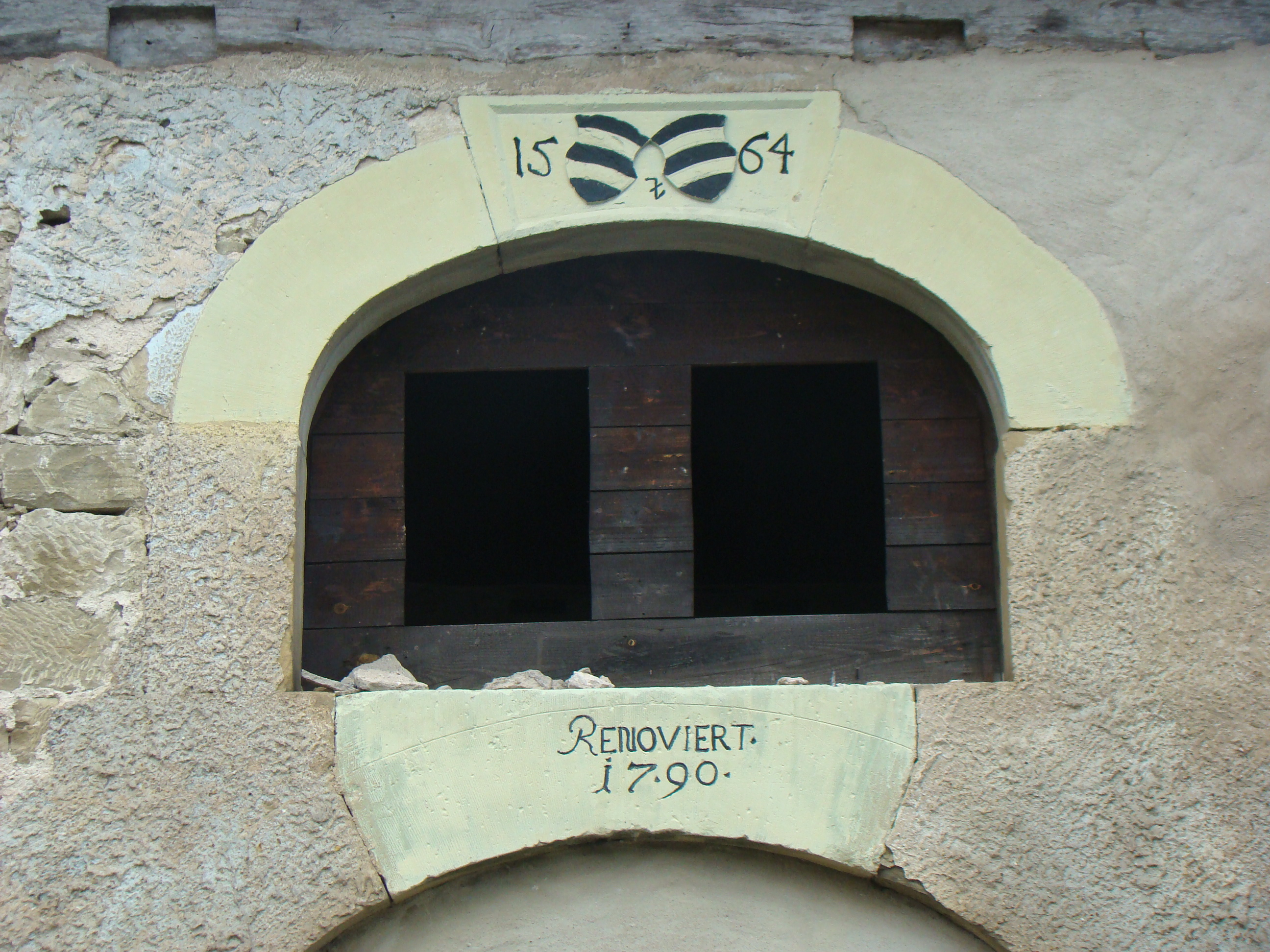 Scheune mit Wappenstein von 1564 am Bonfelder Unterschloss